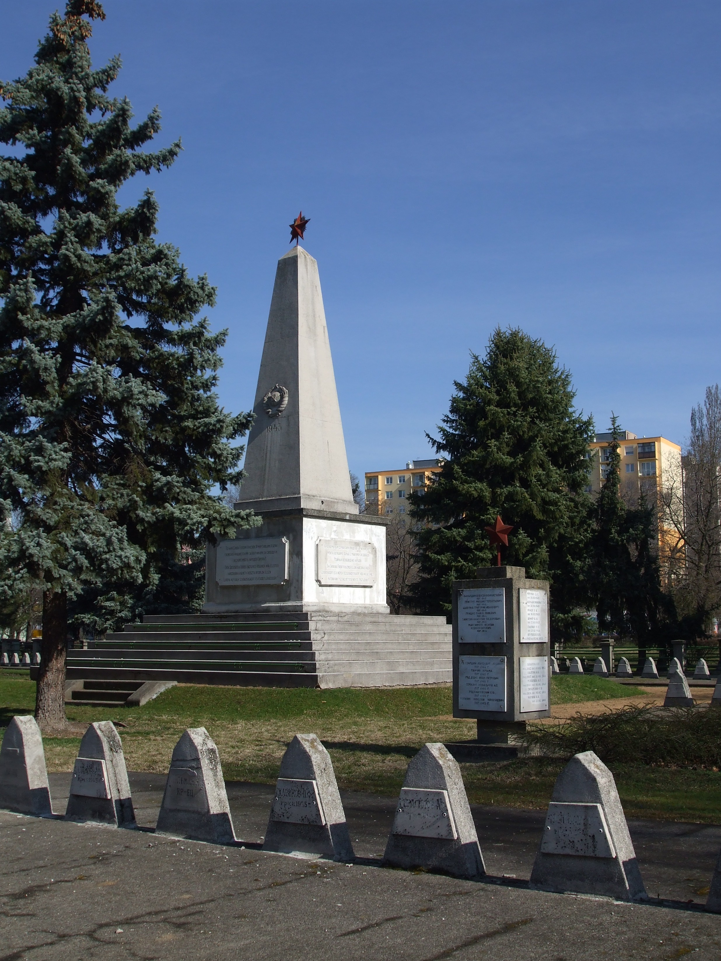 A székesfehérvári szovjet hősi emlékmű katonasírokkal